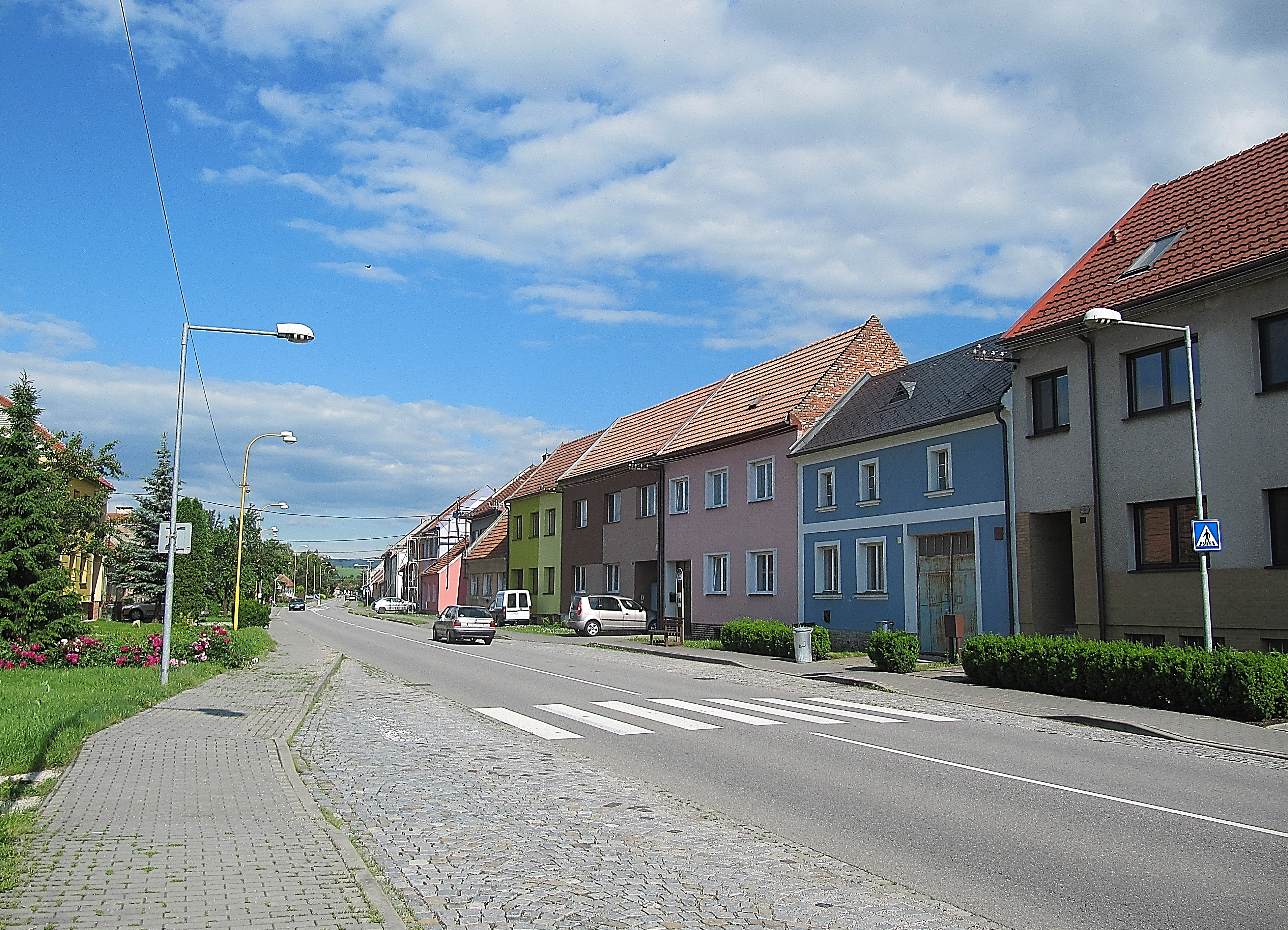 Šumice (UH), hlavní ulice